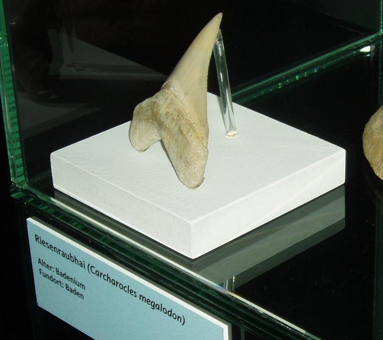 Zahns eines Riesenhais, gefunden bei Baden- aus der Ausstellung des NÖ Landesmuseum: "Meeresstrand am Alpenrand"